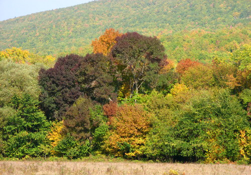 Лес в районе Абинска, Краснодарский край